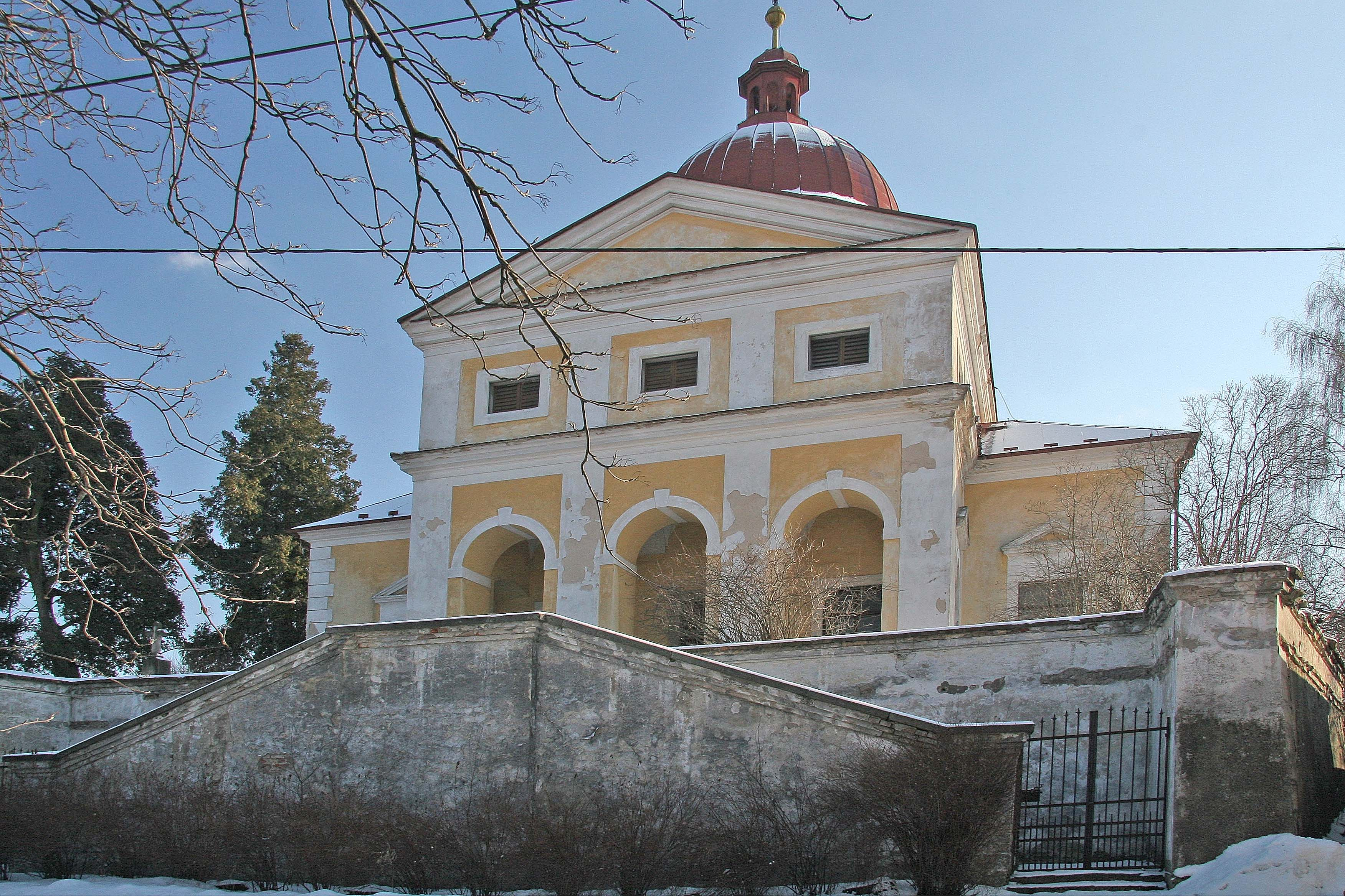 Kostel Svatého Petra Pavla v Dolních Chvatlinách autor: Prazak Date: 37. 2. 2006